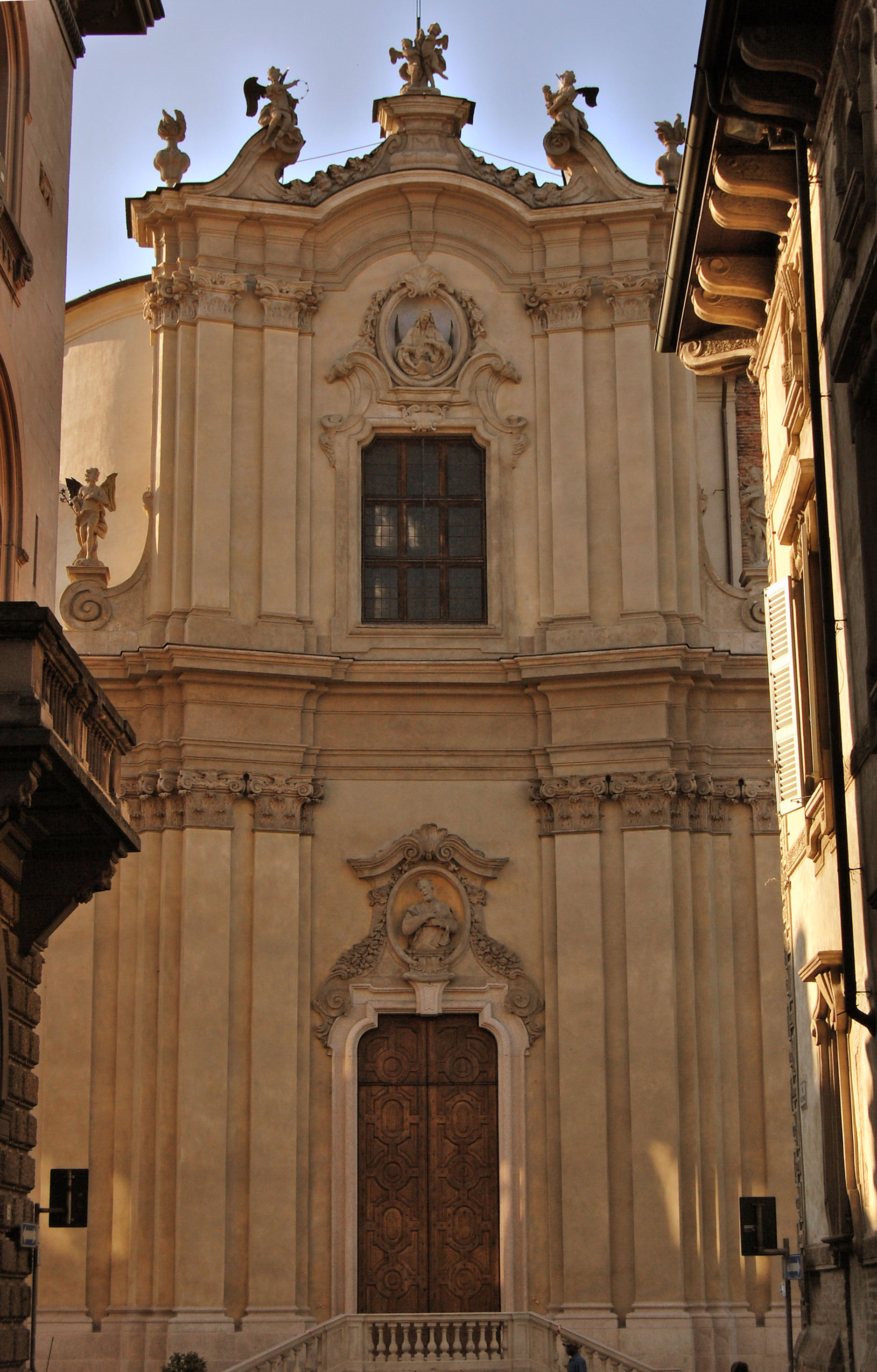 Facciata della Chiesa di San Filippo, Lodi